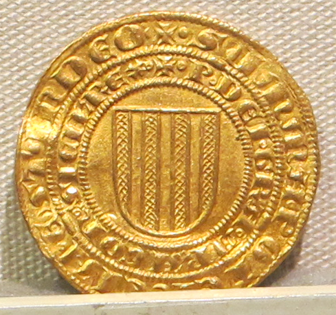 Palazzo Massimo alle Terme